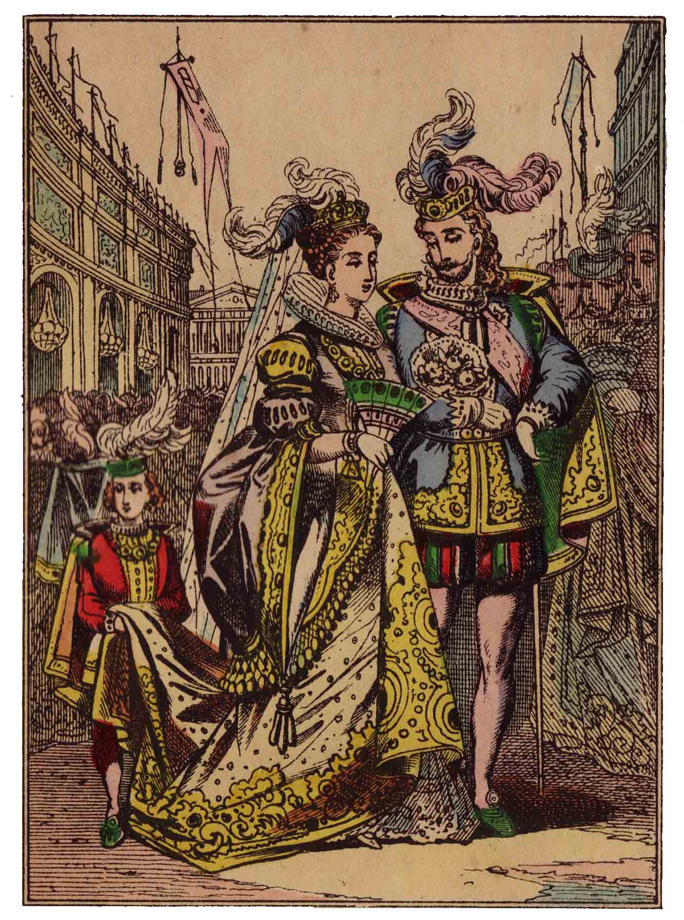 Images d'Épinal : Cendrillon